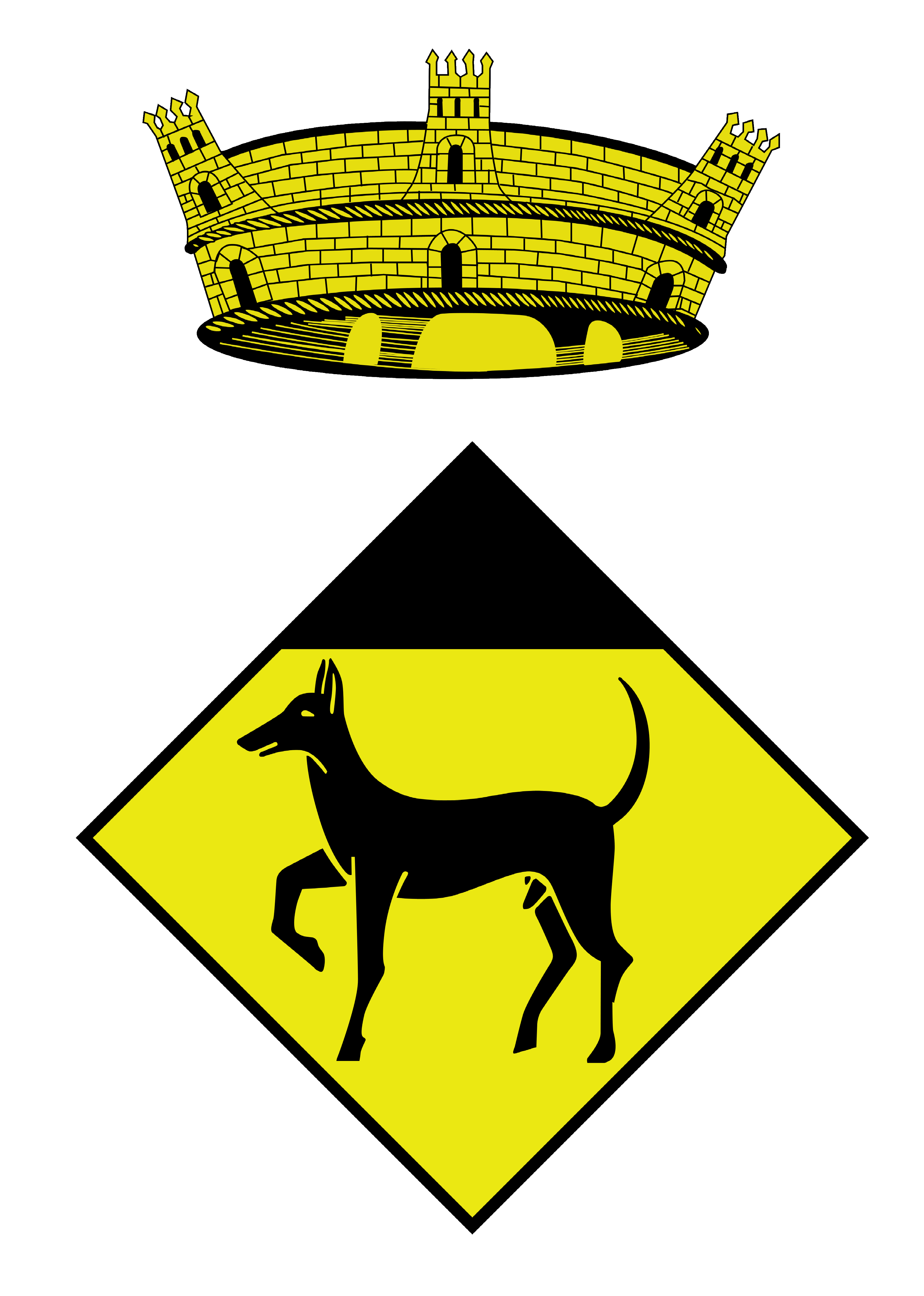 Blasonament. Un escut caironat: d'or (puntejat espès), un gos passant de sable (quadriculat molt fi) i el cap també de sable. Per timbre, una corona mural de poble (el timbre indica la categoria de poble).